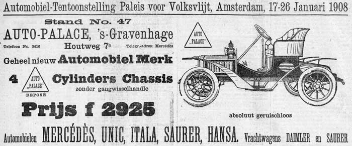 Hansa / Hansa-Lloyd (D) - Auto-Palace, Den Haag advertentie januari 1908